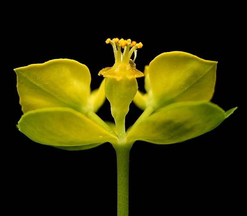 Euphorbia cyparissias